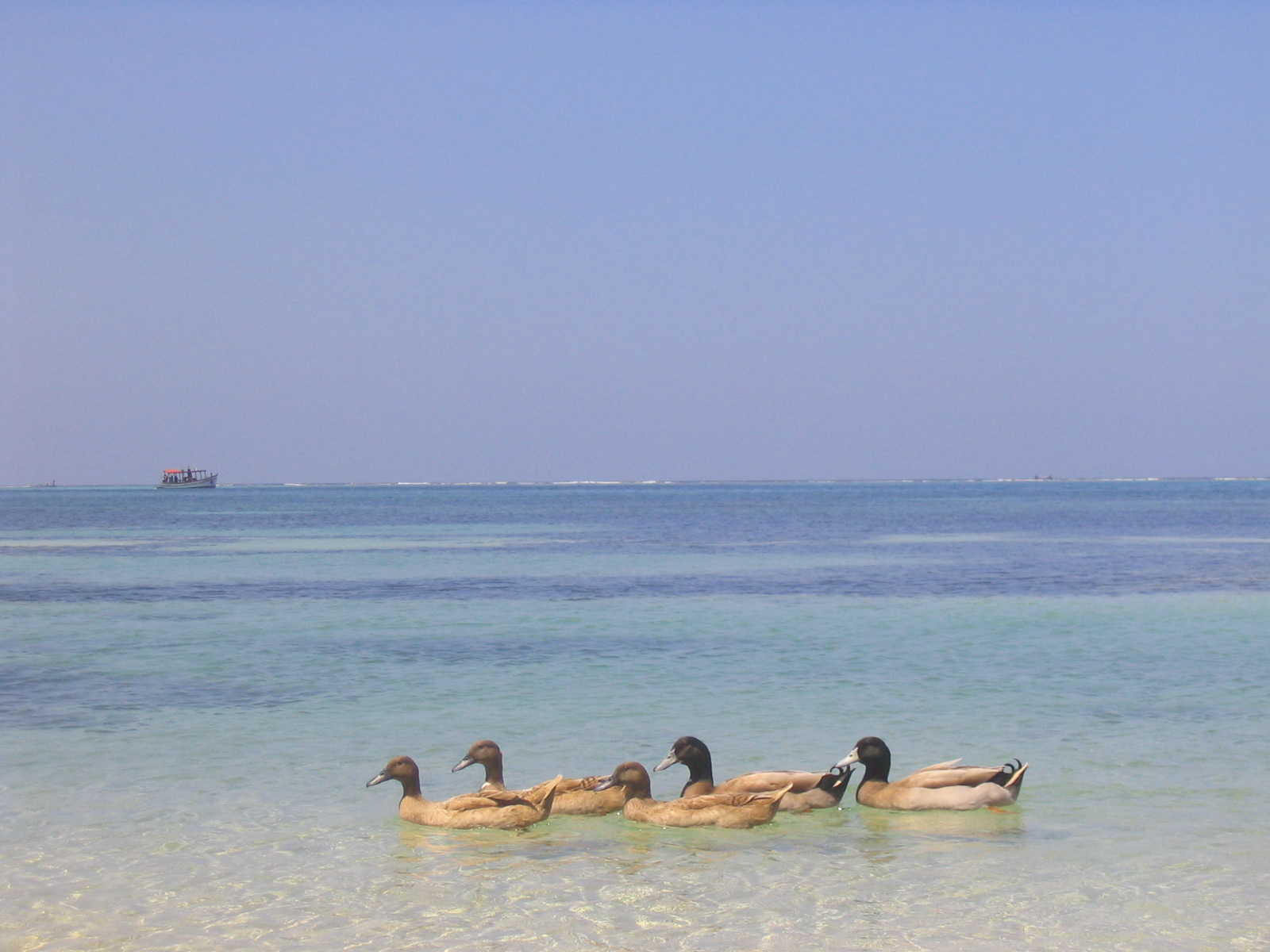 Taken in lakshadweep in feb 2005.